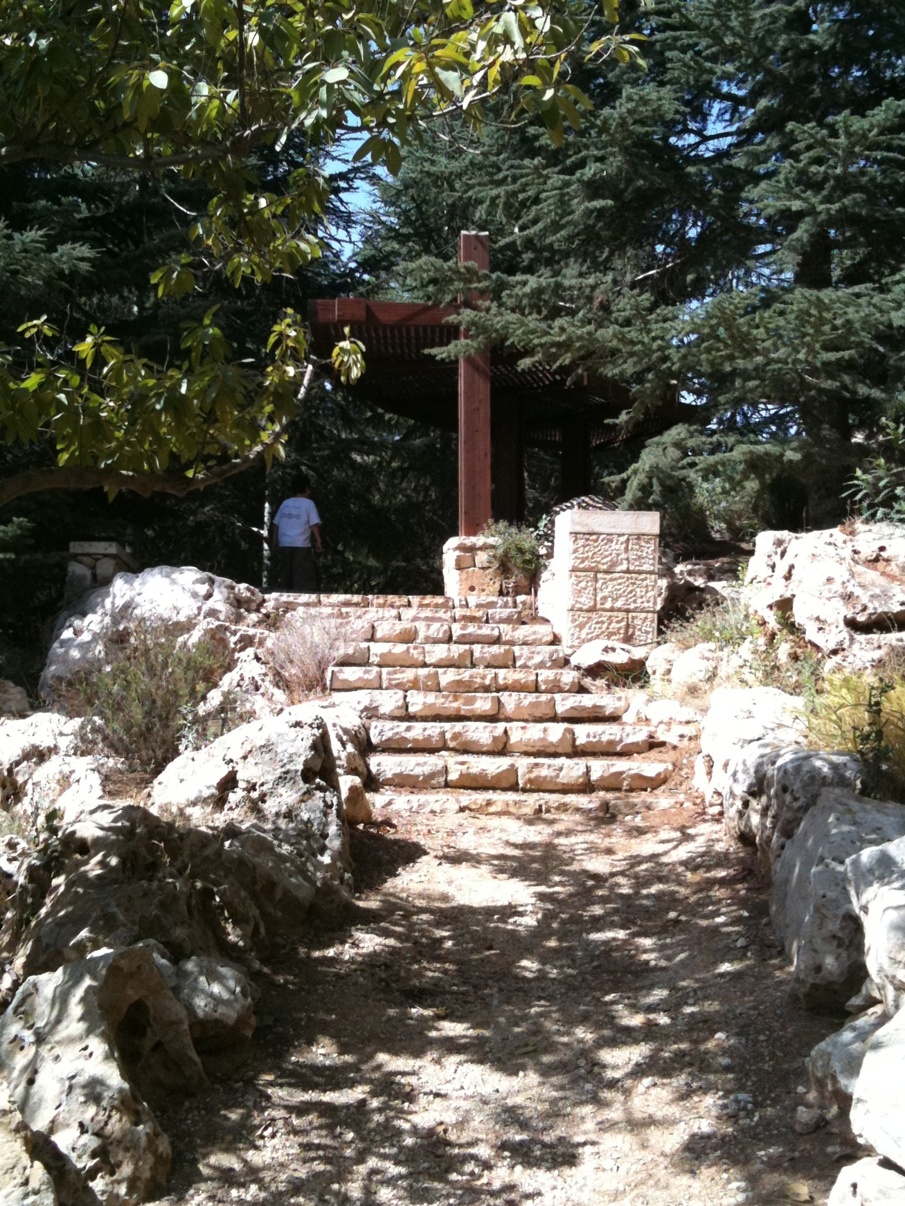 Jerusalem Botanical Gardens, G. Ram, Jerusalem, Israel. הגנים הבוטניים של ירושלים, גבעת רם.